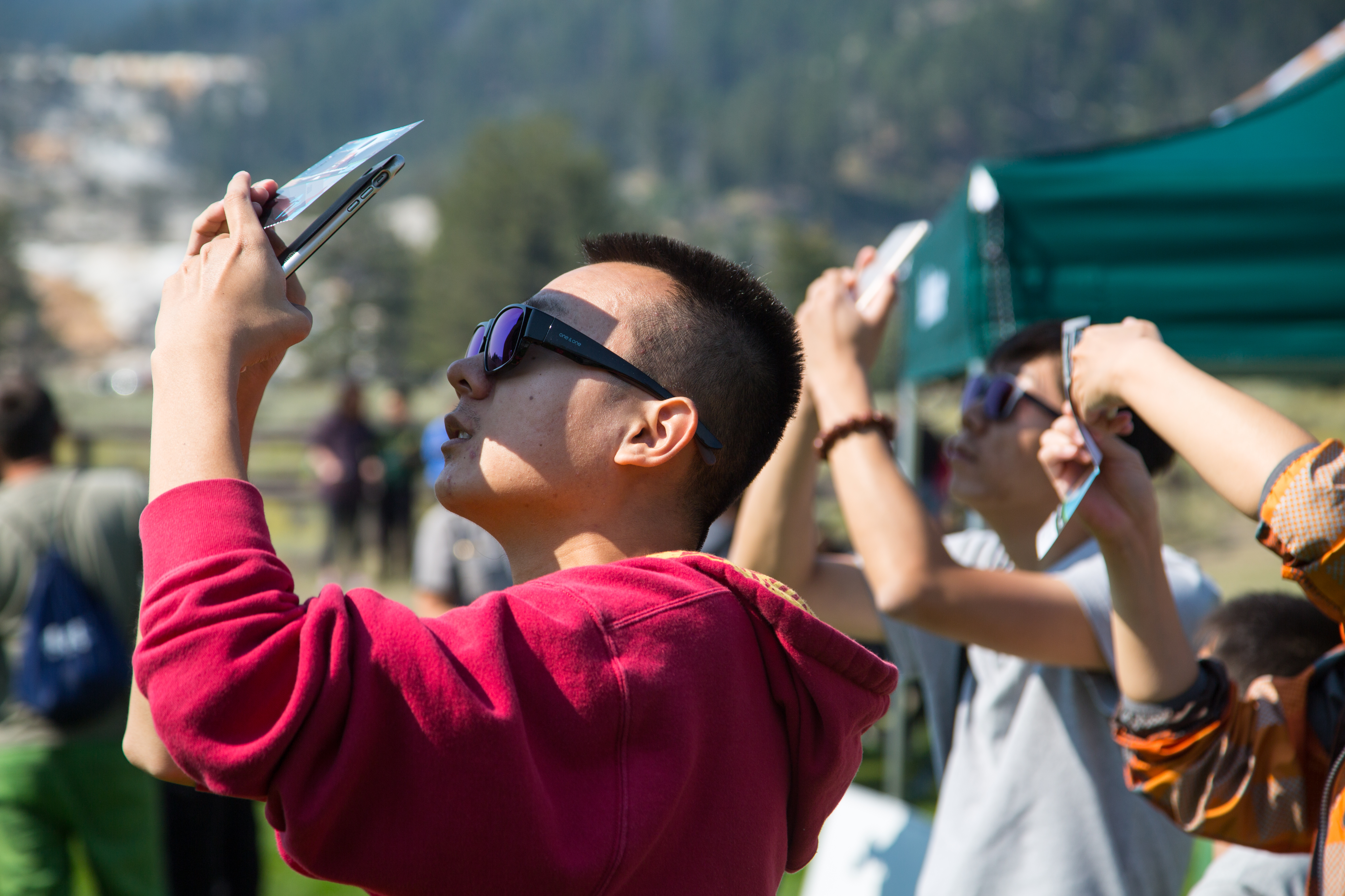 NPS / Neal Herbert